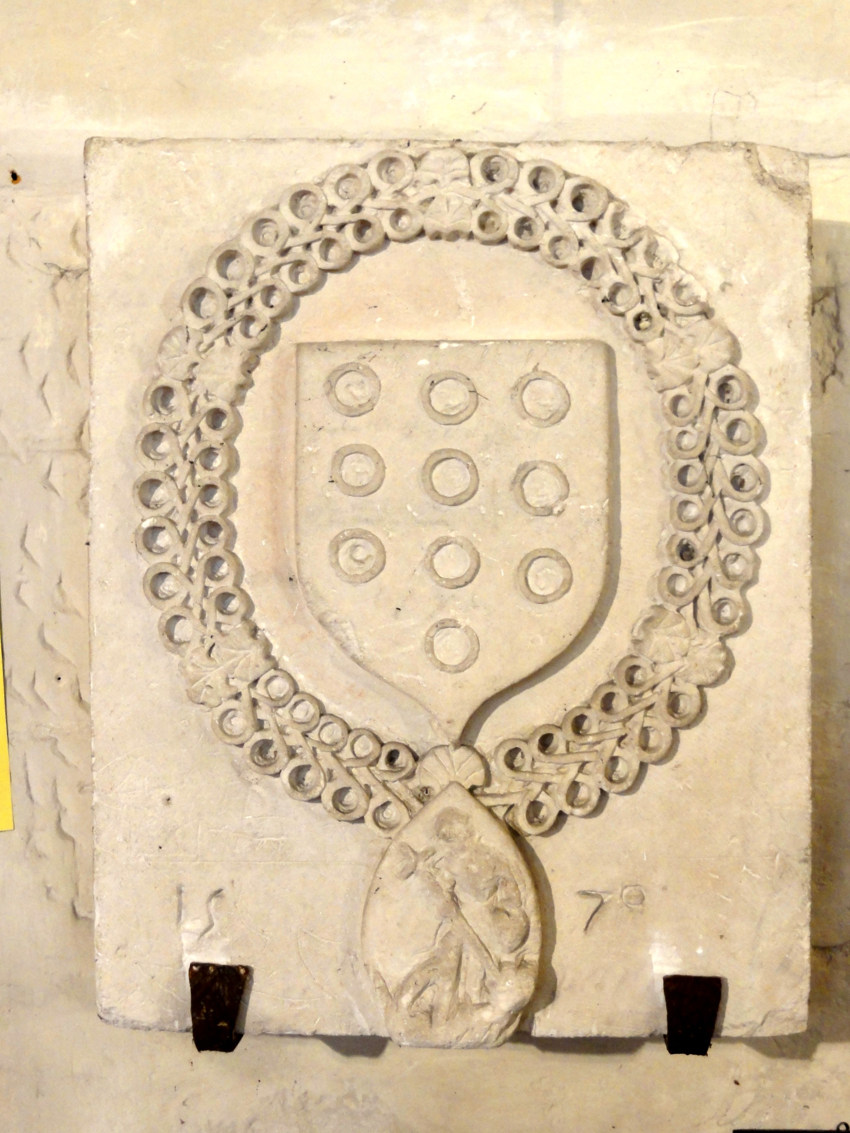 Blason de la famille de Vieux-Pont, seigneurs de Saintines, datant de 1579.